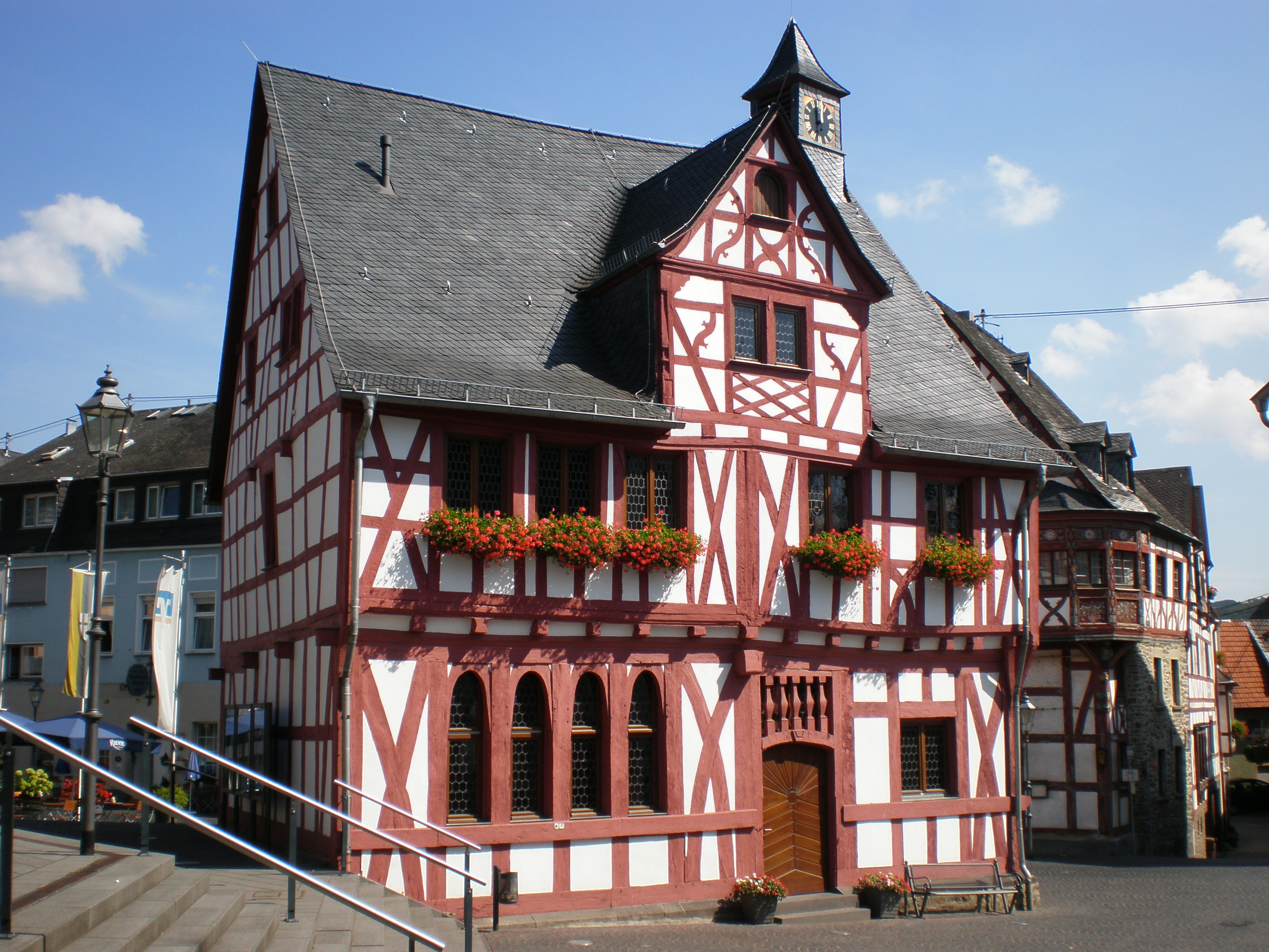 Das alte Rathaus in Rhens